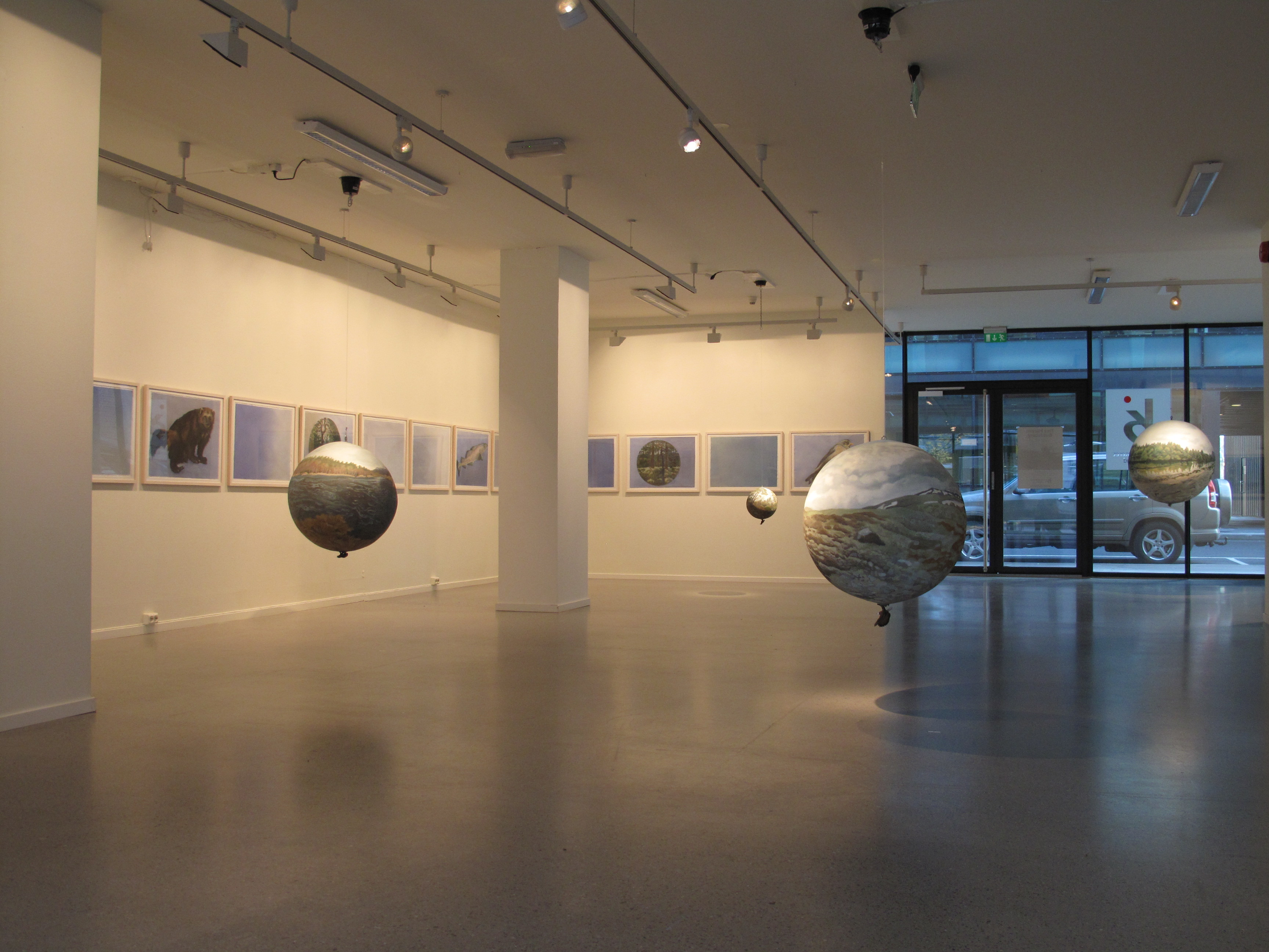 Utstilling Buskerud Kunstsenter